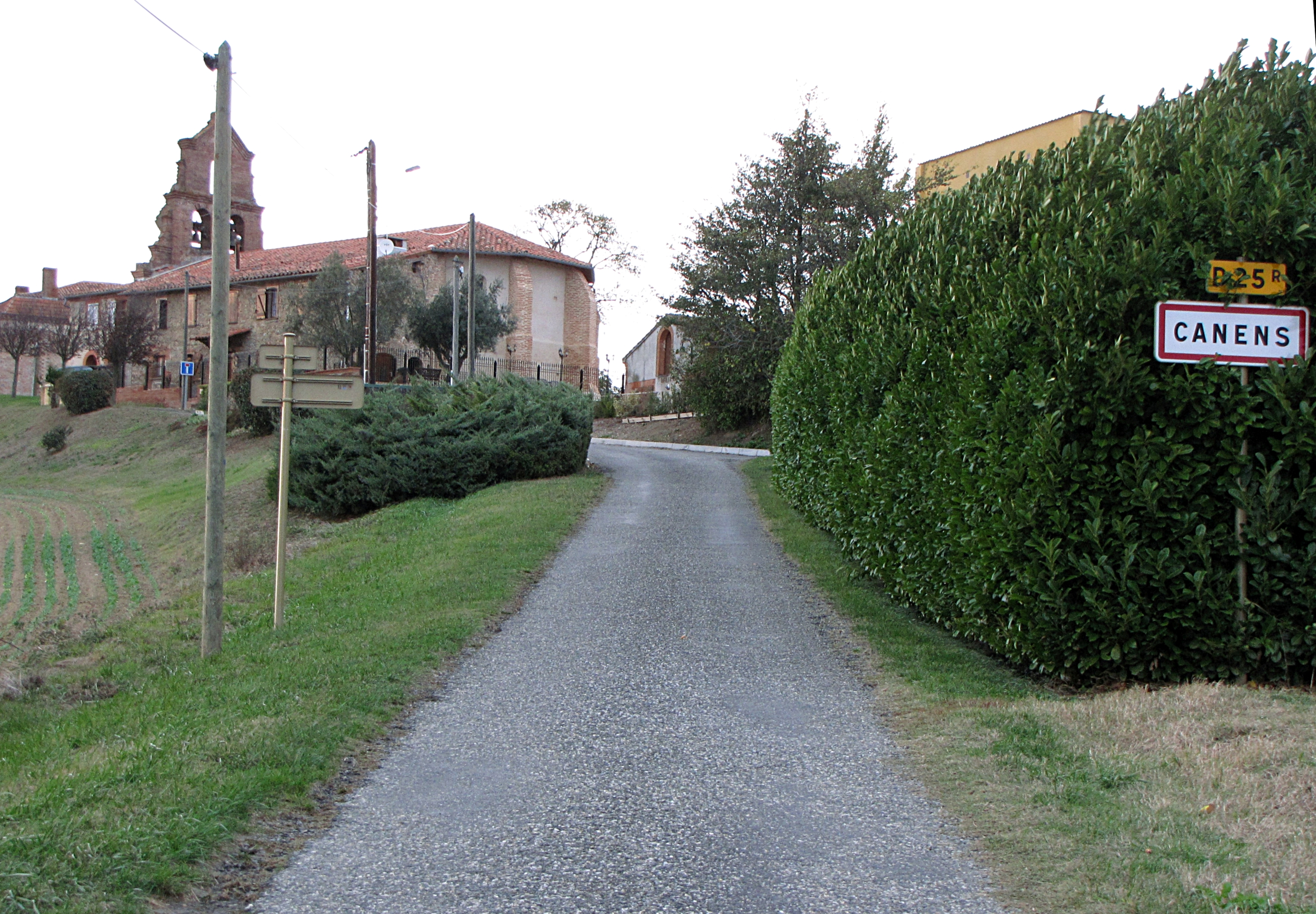 Canens (Haute-Garonne, France)